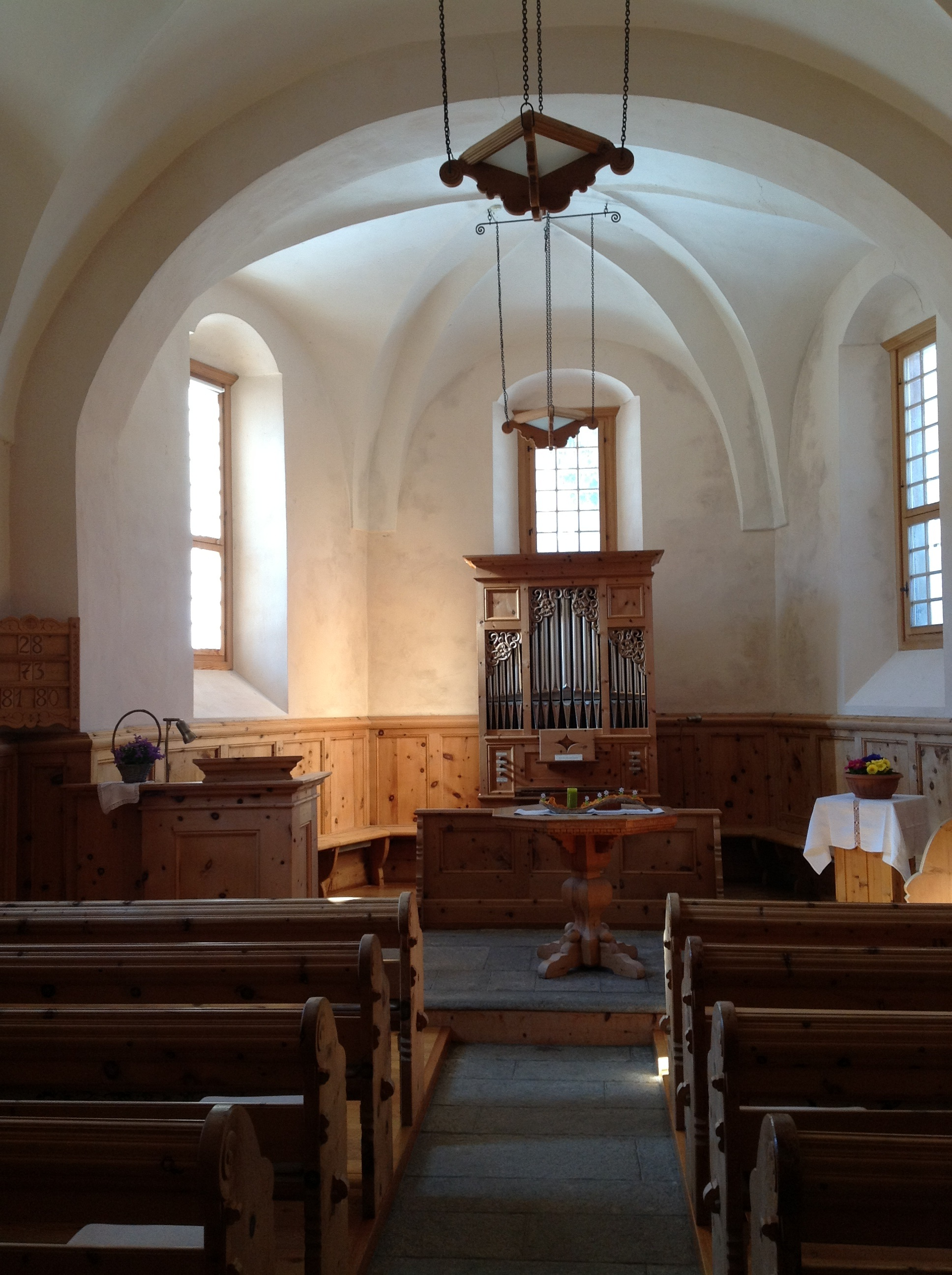 Innenraum der reformierten Kirche in Fuldera